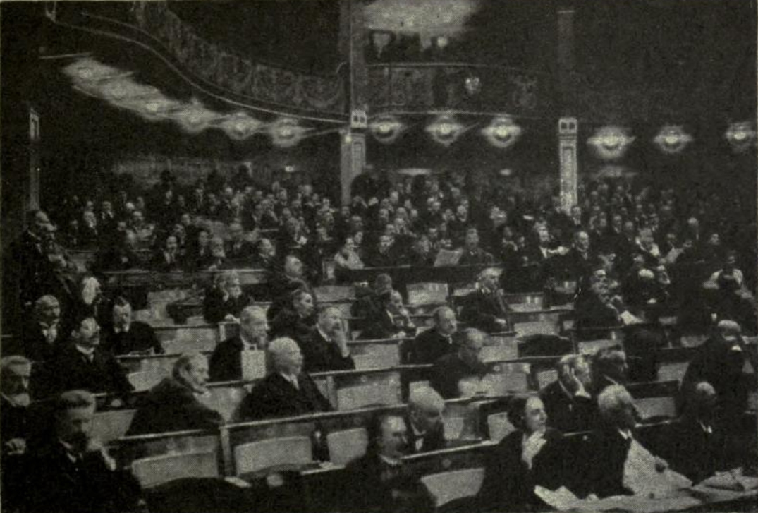 La asamblea nacional alemana en sesión en Weimar, 1919.